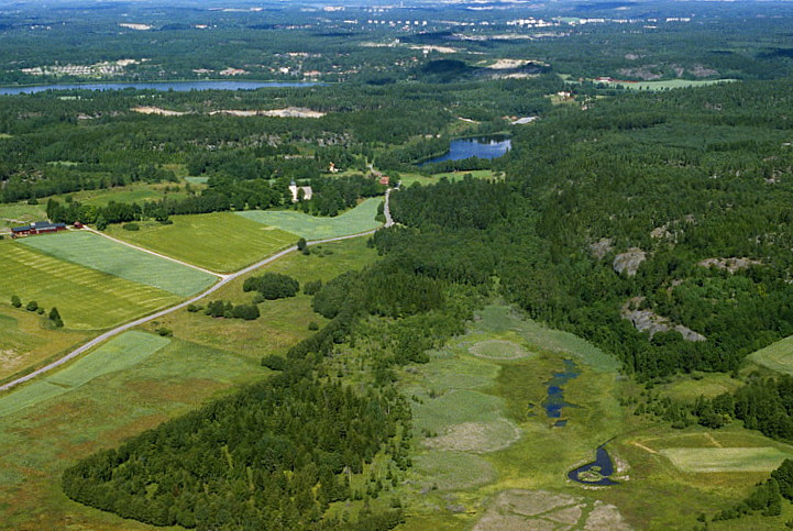 Grödinge kyrka i bildens mitt med resterna efter Kyrksjön längs ner till höger. Bilden är tagen mot (väderstreck): NNO Motiv: Grödinge Nyckelord: Flygbilder, Riksintressen Kategori: KyrkomiljöGrödinge kyrka i bildens mitt. Bilden är tagen mot (väderstreck): NNO.